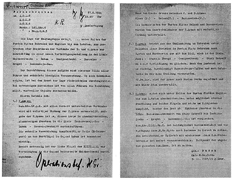 Befehl von Generalfeldmarschall Busch vom 27. Juni 1944